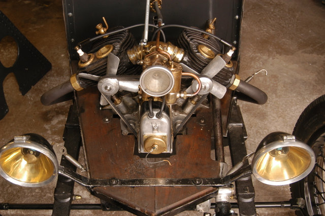 Anzani Motor 2 Zylinder 998cc verbaut in einem französischen Cyclecar der Marke Demarcay von Baron Edmond de Marcay